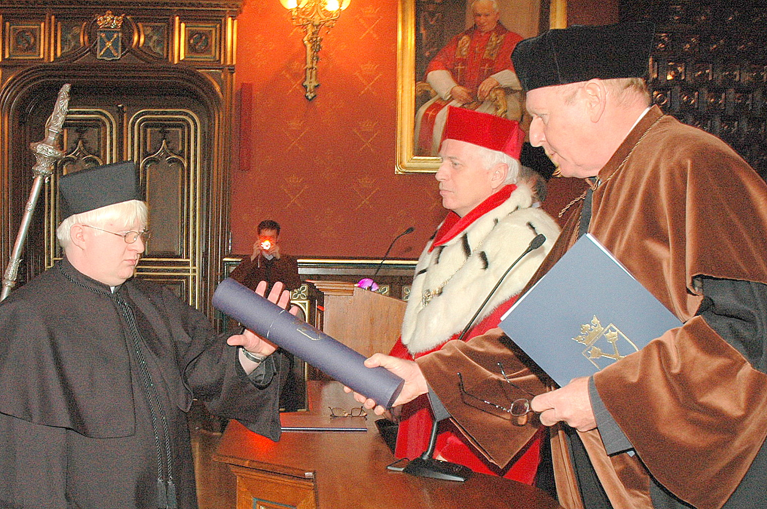 Mariusz Parlicki odbiera dyplom ukończenia studiów doktoranckich Wydziału Zarządzania i Komunikacji Społecznej Uniwersytetu Jagiellońskiego